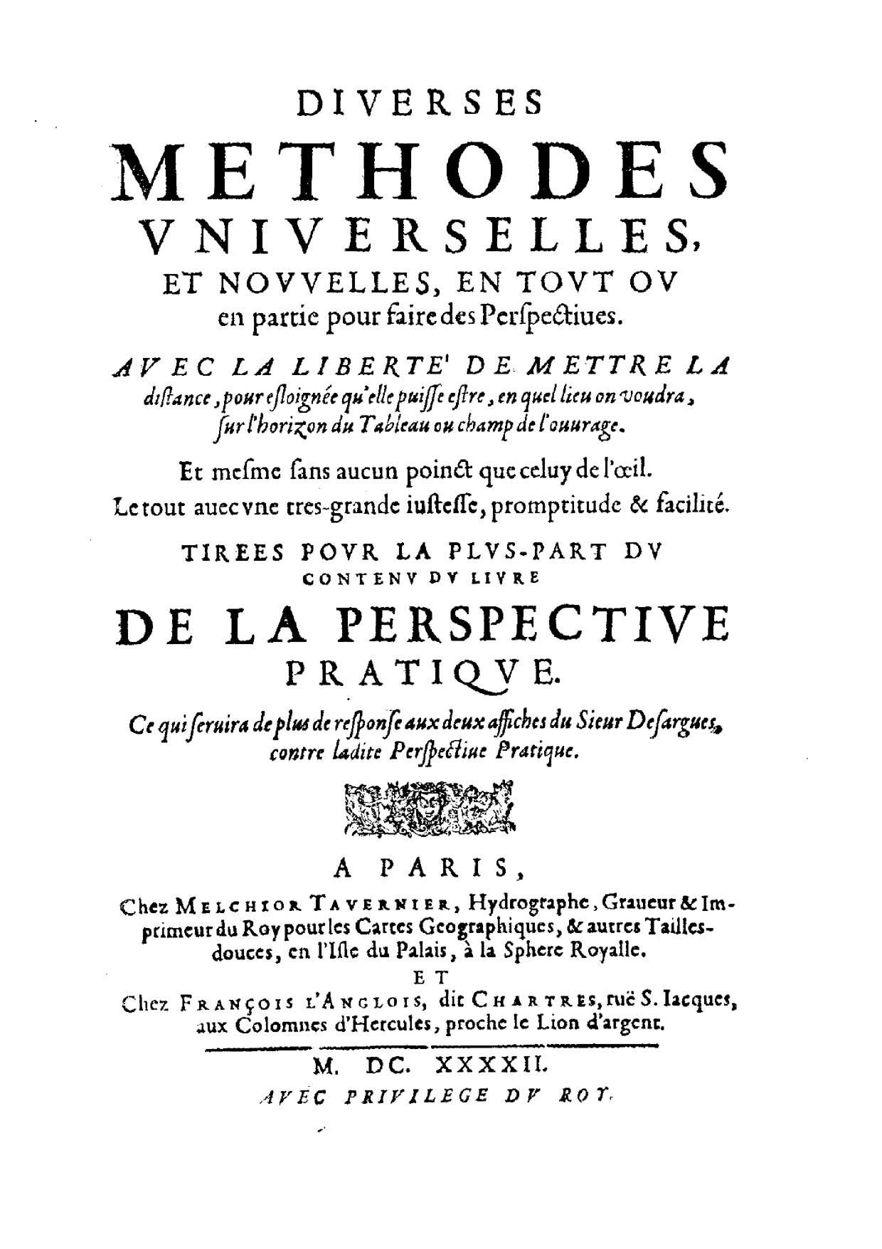 Diuerses methodes vniuerselles et nouuelles, en tout ou en partie pour faire des perspectiues. ... Tirees pour la plus-part du contenu du liure de La perspective pratique. …. - A Paris : chez Melchior Tauernier hydrographe, graueur & imprimeur du Roy pour les cartes geographiques, 6 autres tailles-douces, en l'isle du Palais, à la sphere royalle ; chez François L'Anglois, dit Chartres, rue S. Jacques, aux colomnes d'Hercules, proche le li, 1642. - [15] p., 10 p. doppie : ill. ; 4º .